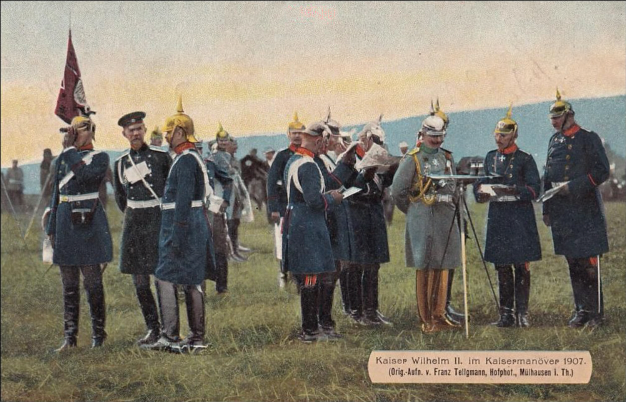 Kaisermanöver